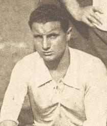 Hector Castro con la Selección de Uruguay en el Campeonato Sudamericano de 1926